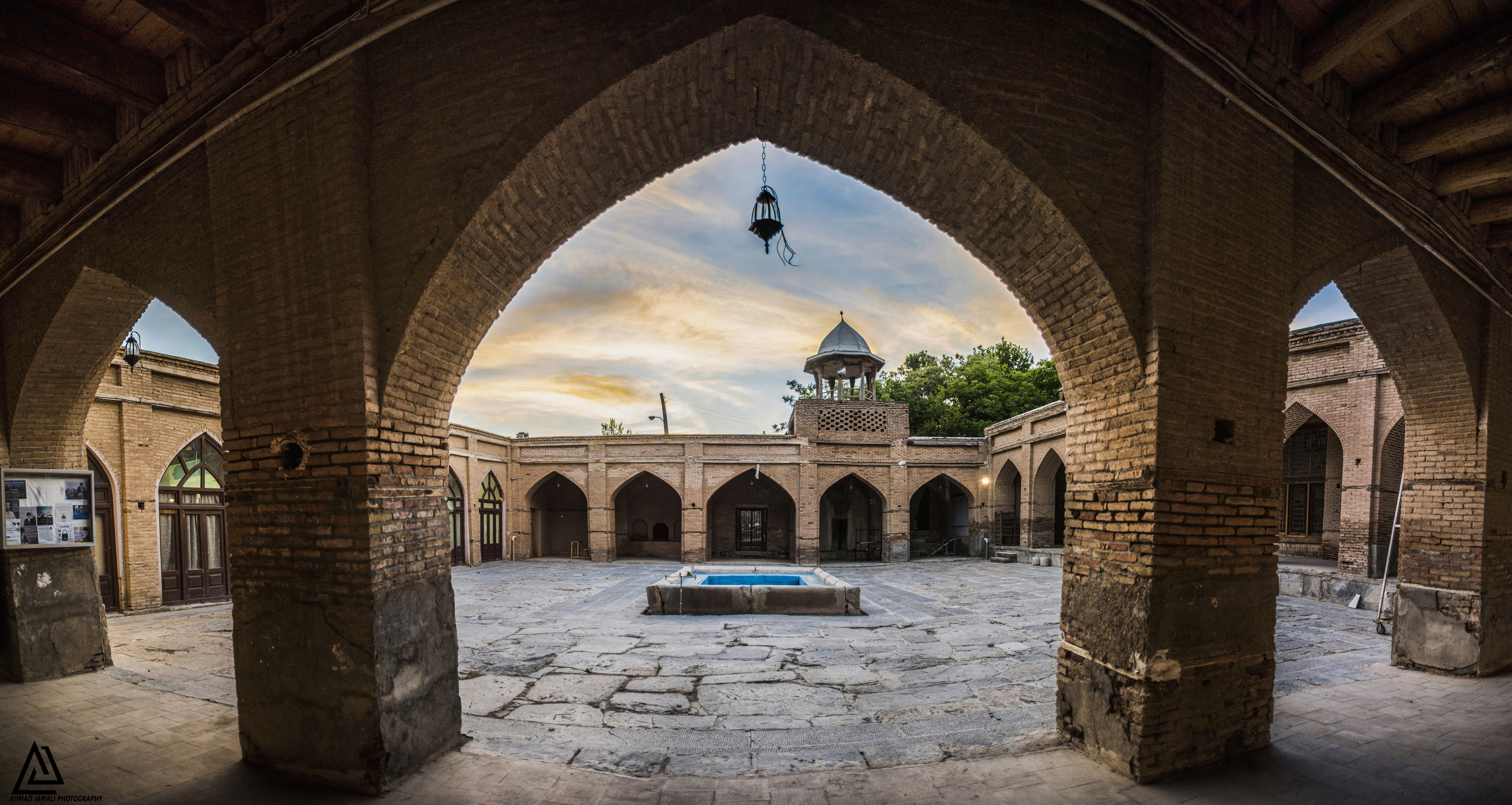 نمایی از مسجد جامع خوانسار